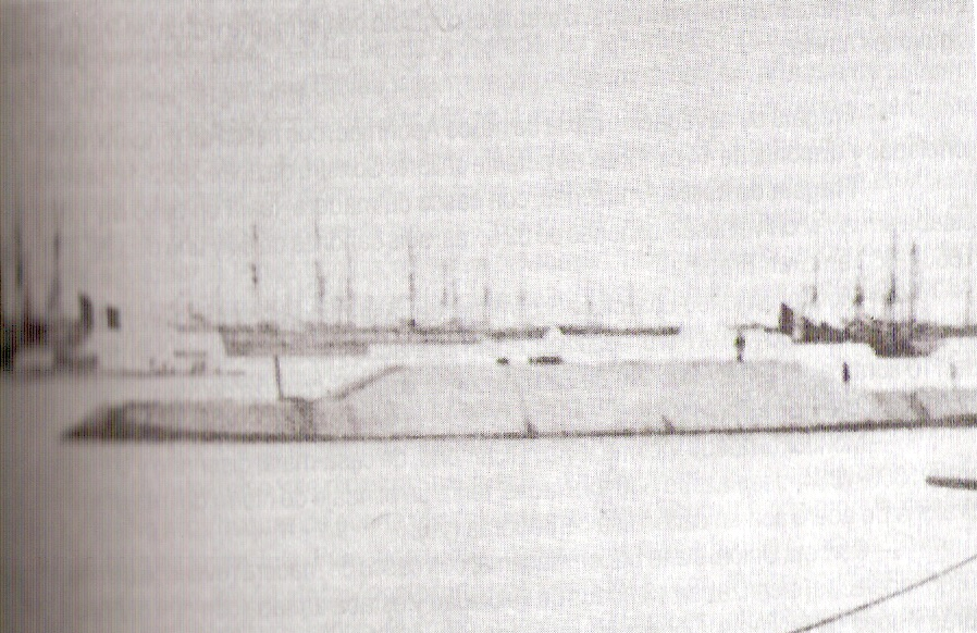 El BAP Loa como buque blindado de casamata